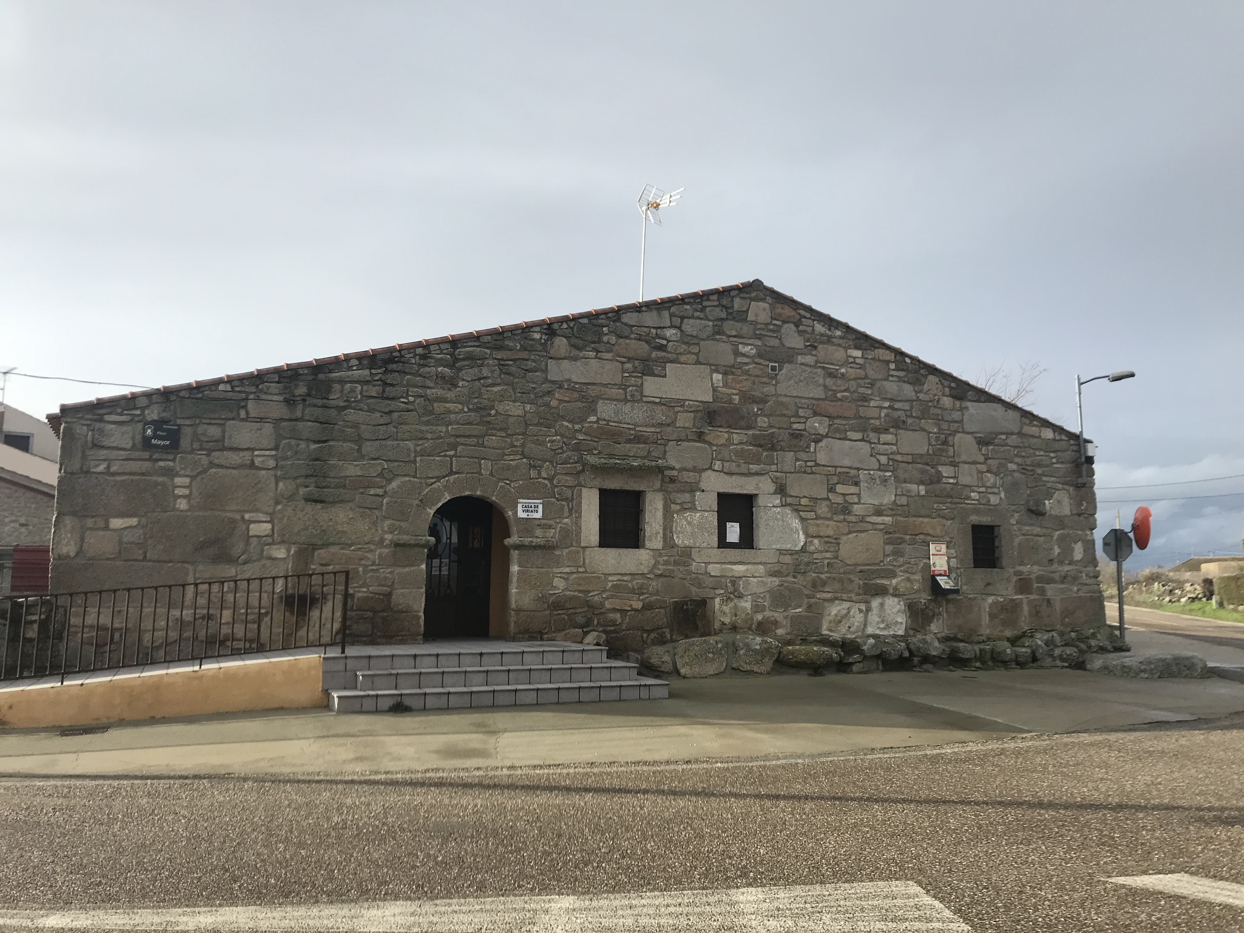 Fachada lateral de la "Casa de Viriato" en Torrefrades, Zamora, España